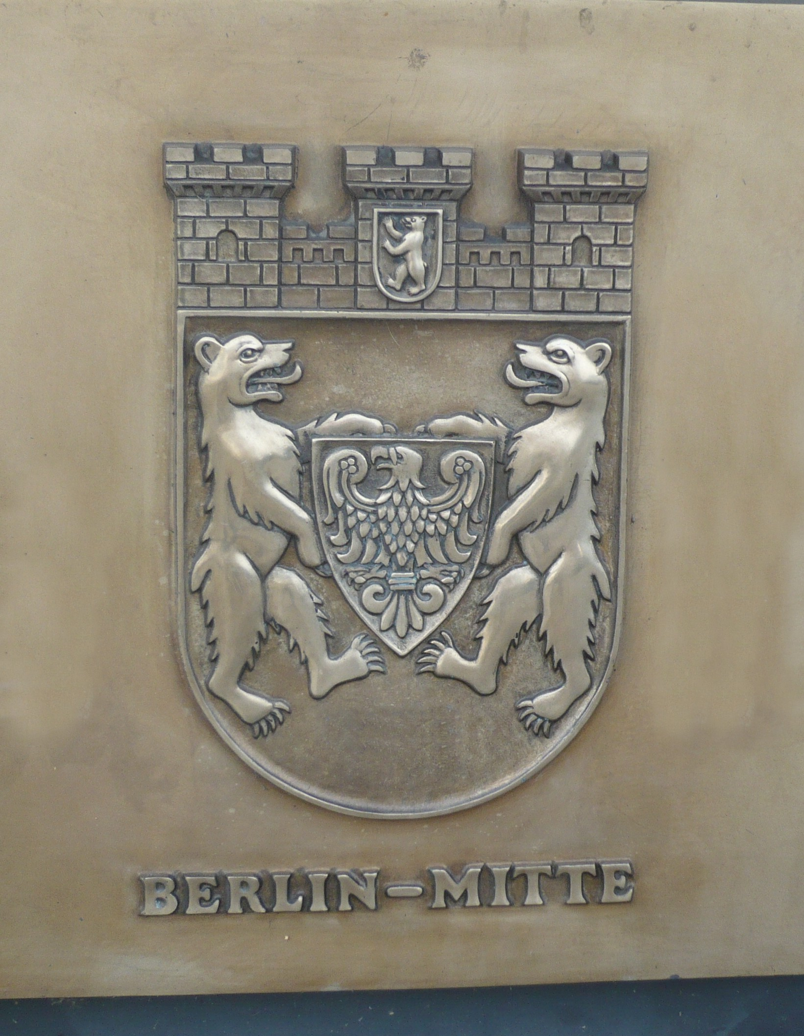 Berlin; Michaelbrücke, Relief